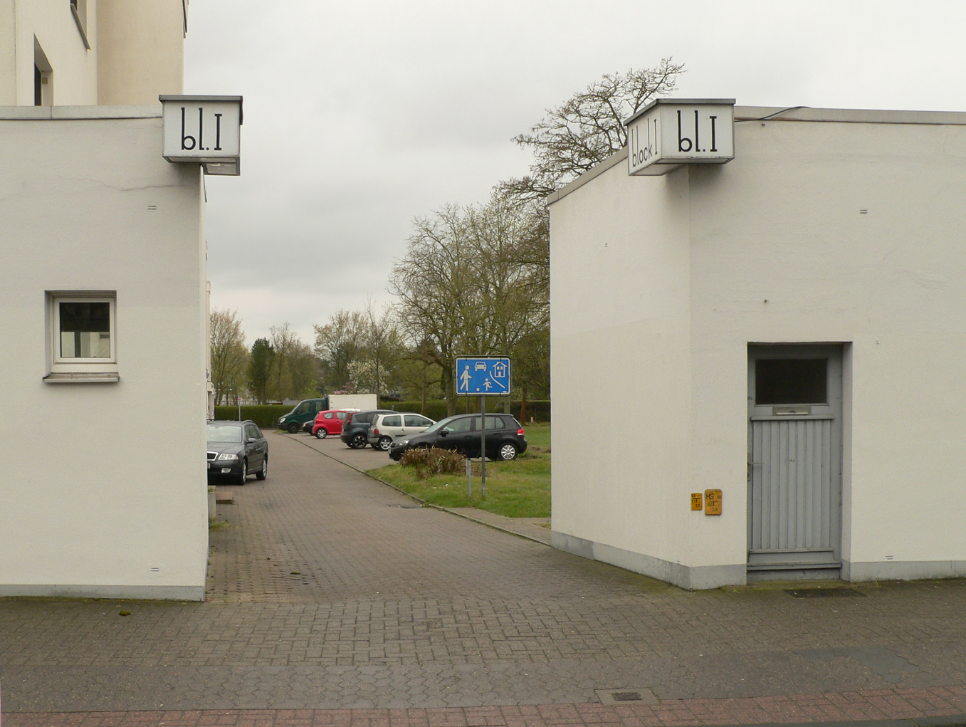 Einfahrt Siedlung Georgsgarten in Celle mit Leuchtkästen